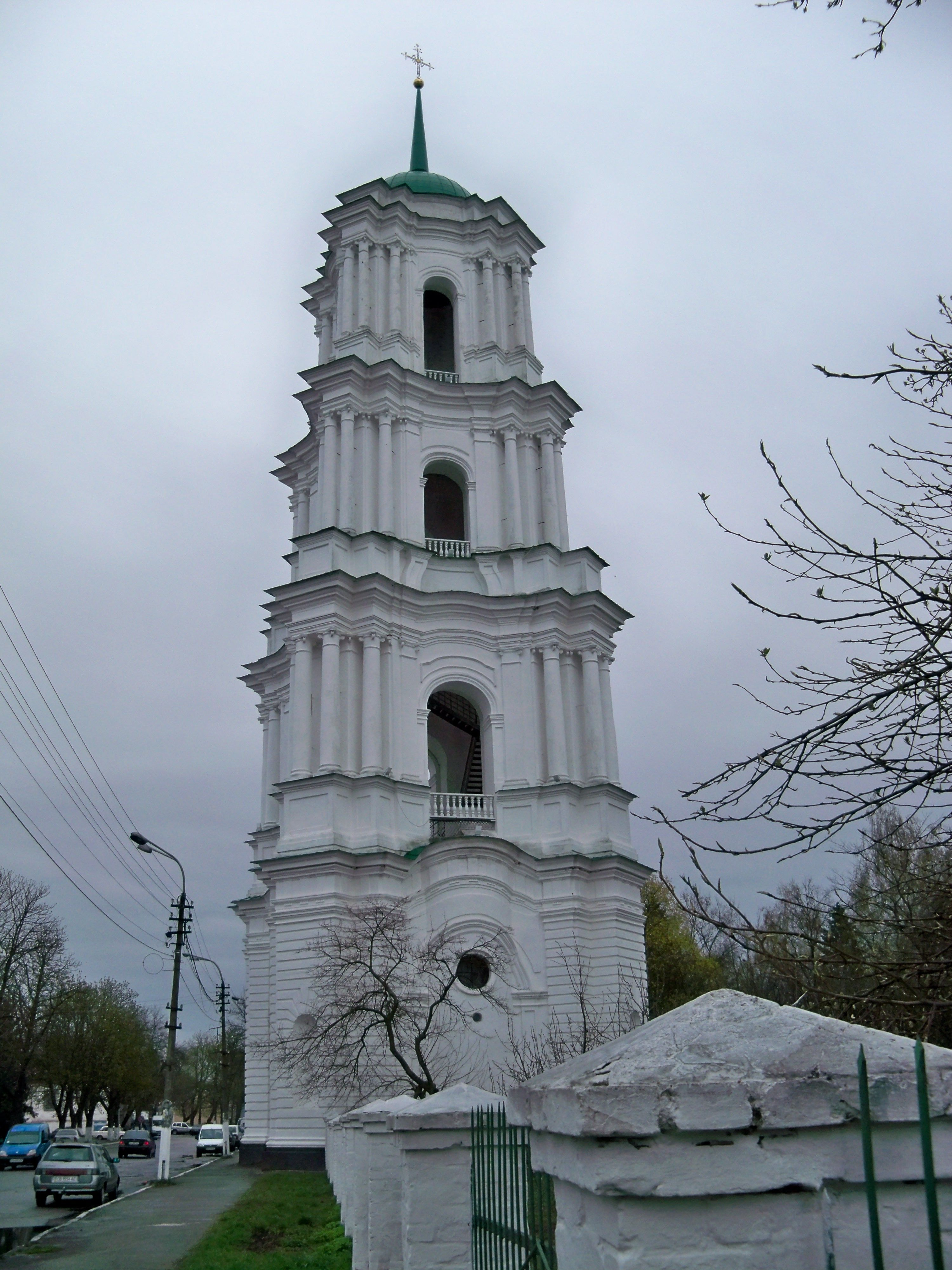 Дзвіниця собору Різдва Богородиці (мур.), Козелець, вул.Даневича, 1